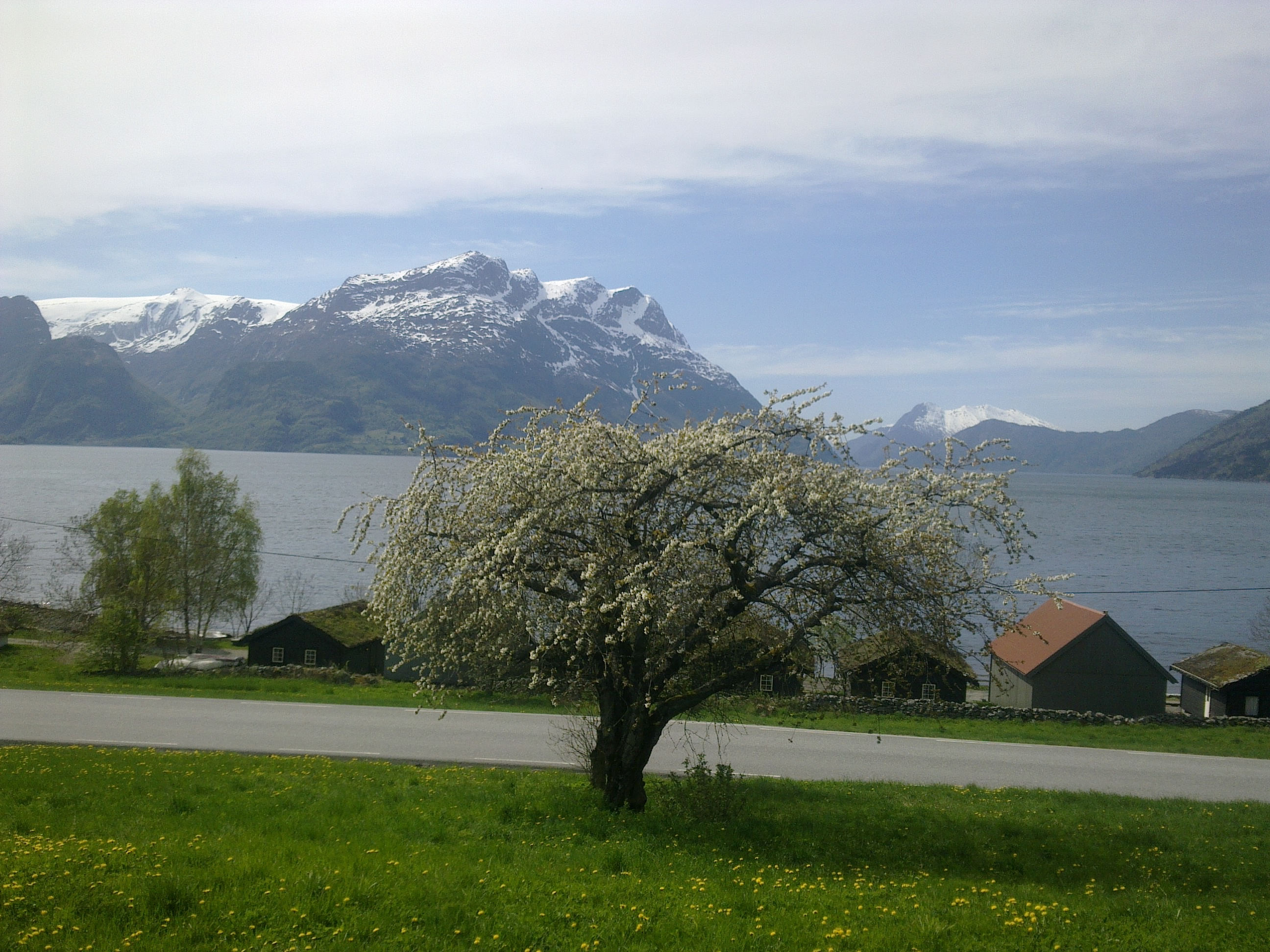 Utsikt mot Ålfoten